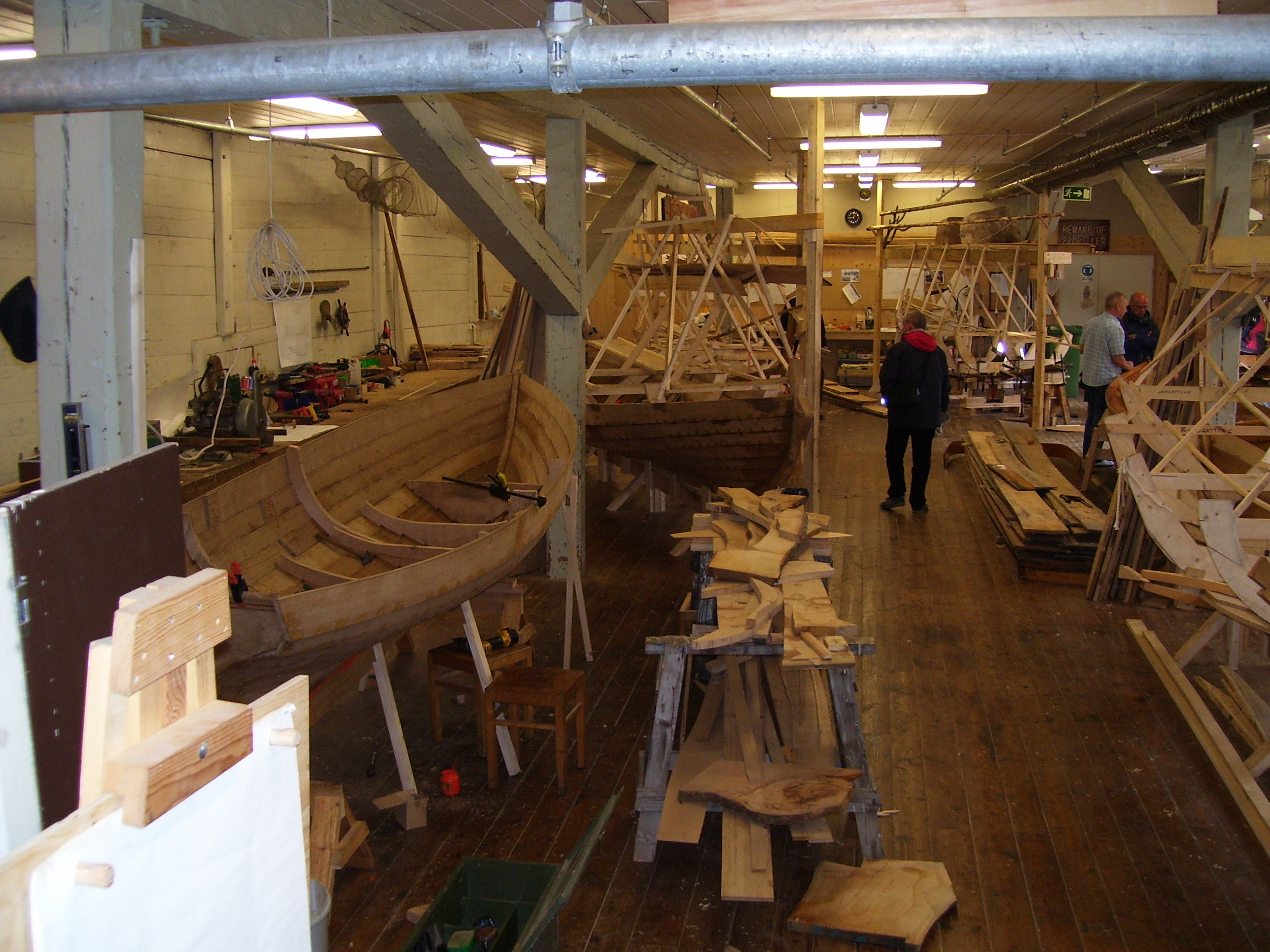 tradycyjny warsztat szkutniczy przy muzeum w Karlskronie